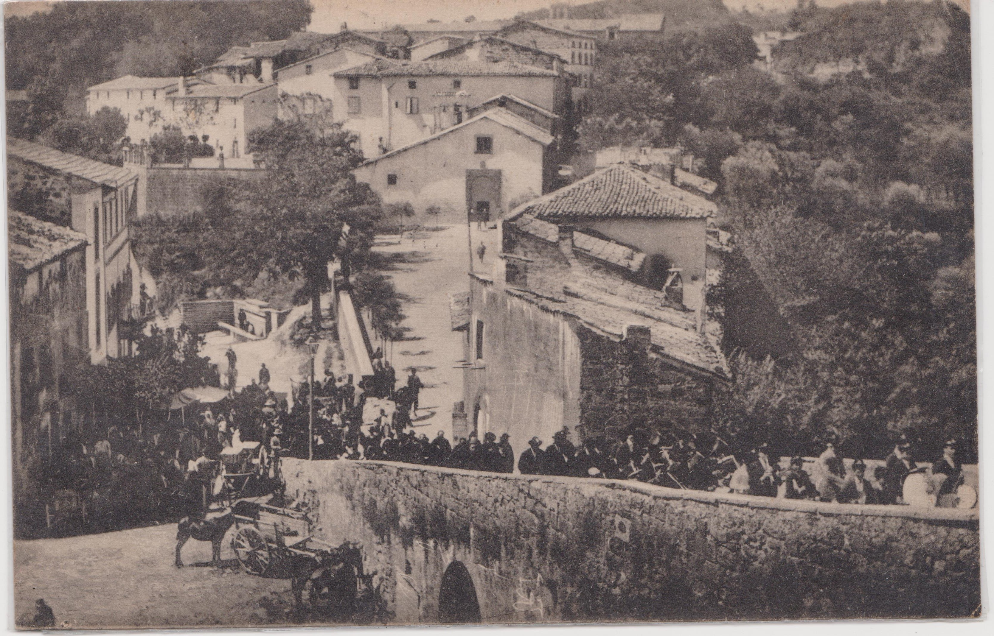 Il borgo di Celleno in una vecchia foto